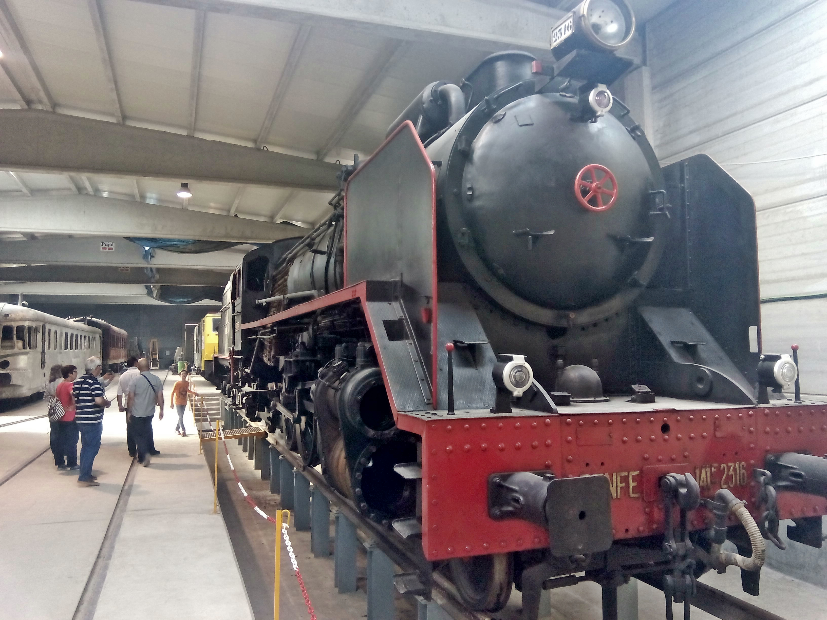 Mikado